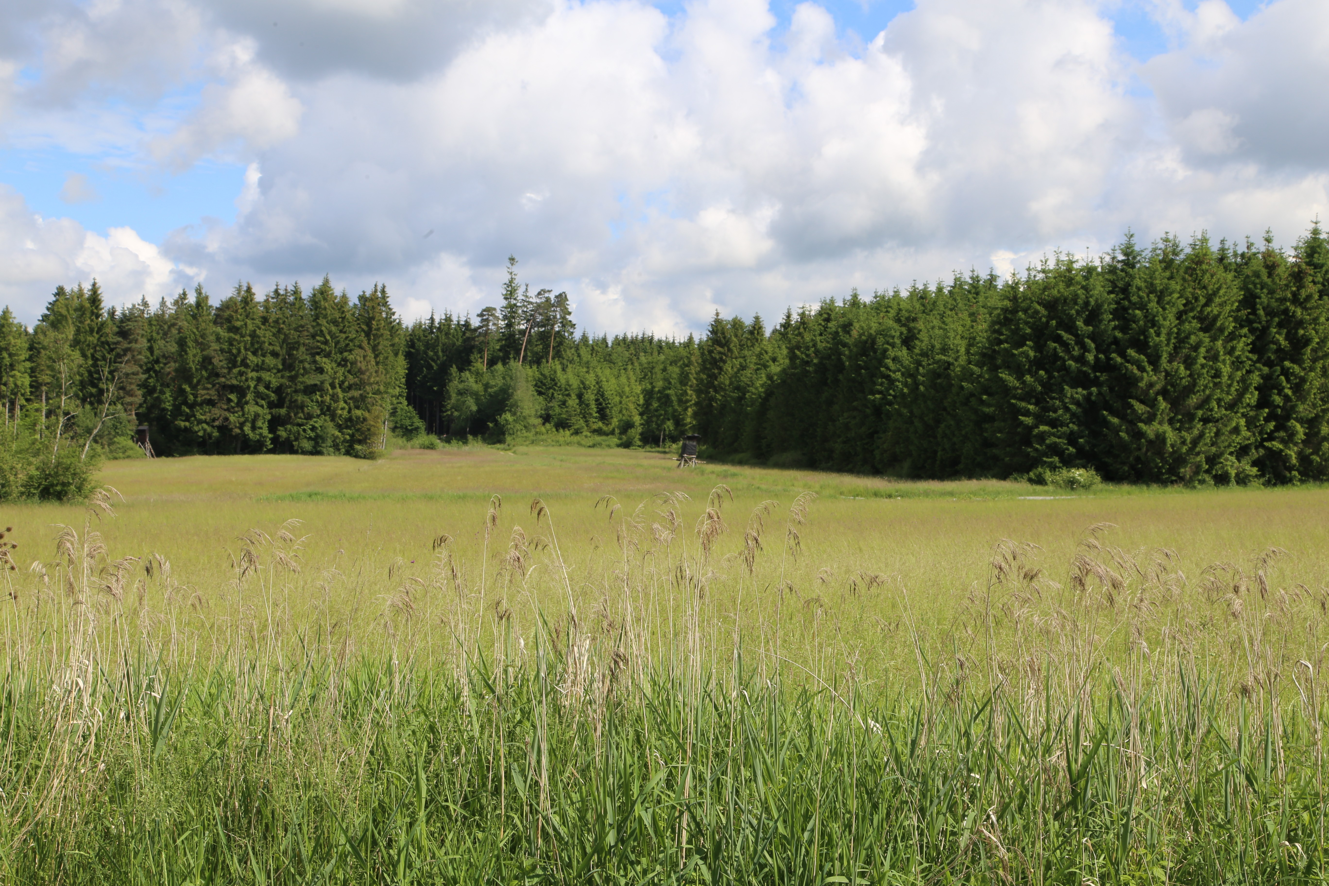 Naturschutzgebiet Kalten, Kolbermoor, NSG-00347.01